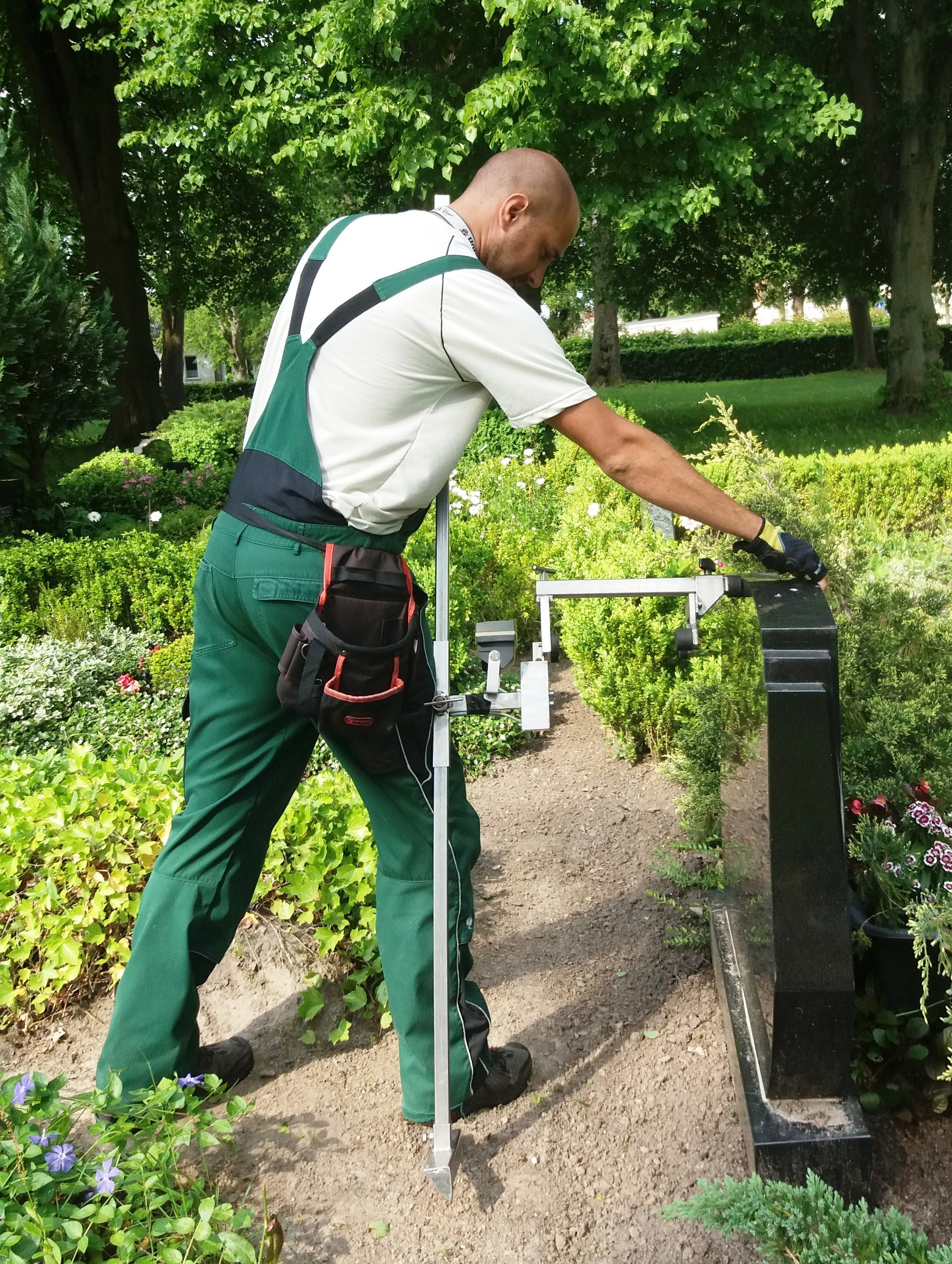 Bei der jährlichen Standfestigkeitsüberprüfung der Grabsteine auf dem Friedhof wird mit hochtechnischem und geeichtem Gerät eine vorgeschriebene Drucklast auf das Grabmahl ausgeübt.